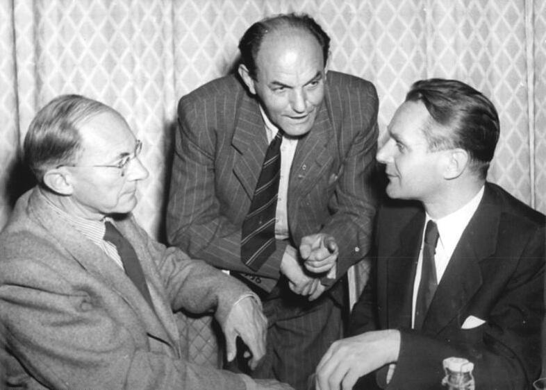 Zentralbild Weiß 3 Motive 1.10.1954 Abschiedsempfang für ausländische Schriftsteller in Berlin Am 30.9.1954 fand im Hotel Johannishof, Berlin, ein Abschiedsempfang für polnische, Tschechoslowakische, französische und albanische Schriftsteller statt, die sich längere Zeit in der Deutschen Demokratischen Republik aufgehalten hatten. UBz: (V.l.n.r.) Während des Empfanges im Gespräch der Schriftsteller Ludwig Renn, der polnische Schriftsteller Sowinski und Herr Melem von der Gesellschaft für kulturelle Verbindungen mit dem Ausklang.